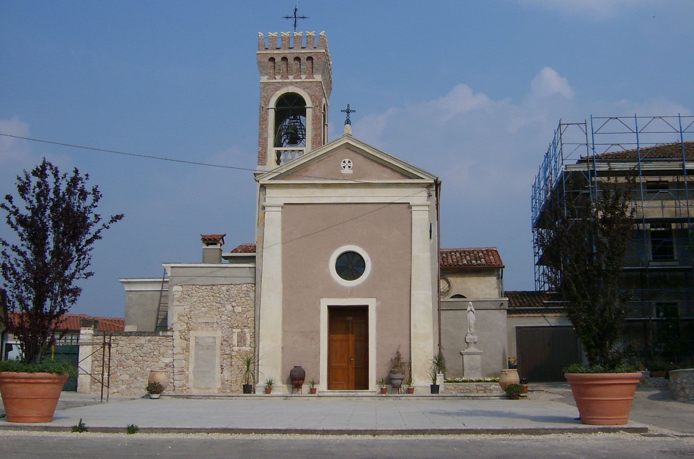 Chiesa di S. Michele Arcangelo a Corlanzone (fraz. di Alonte). Fonte Sito Comune di Alonte Utente:CapPixel